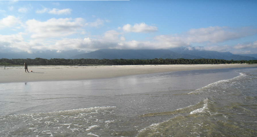 foto da praia de itaguaré